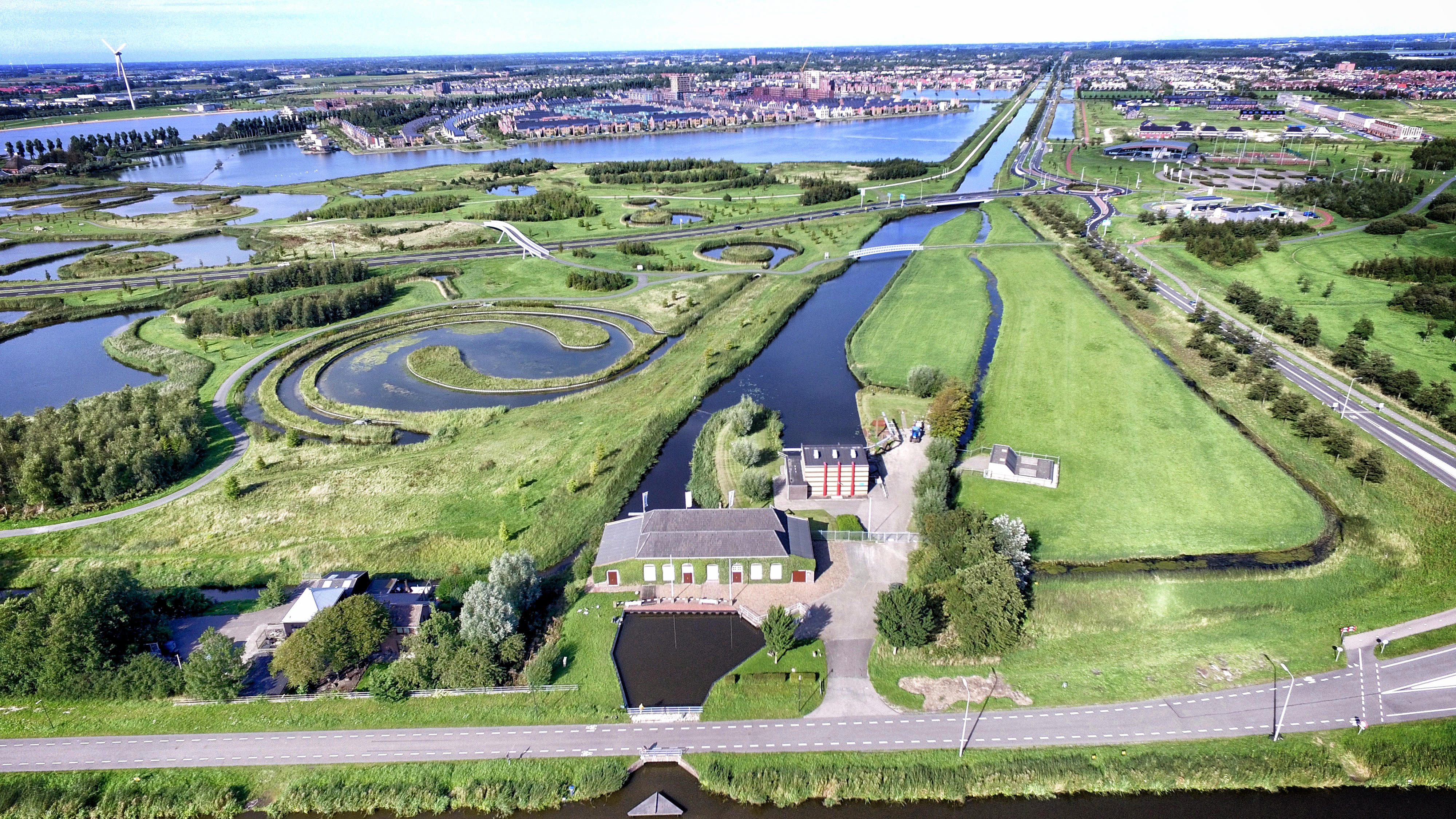 Lokatie van het Poldermuseum is zo goed te zien vanuit de lucht en het gebouw is opnieuw weer gelegen in een waterrijke omgeving. Het huidige gemaal is het rechthoekige gebouw rechtsachter het poldermuseum. Die zorgt als enig gemaal nu voor onze droge voeten...